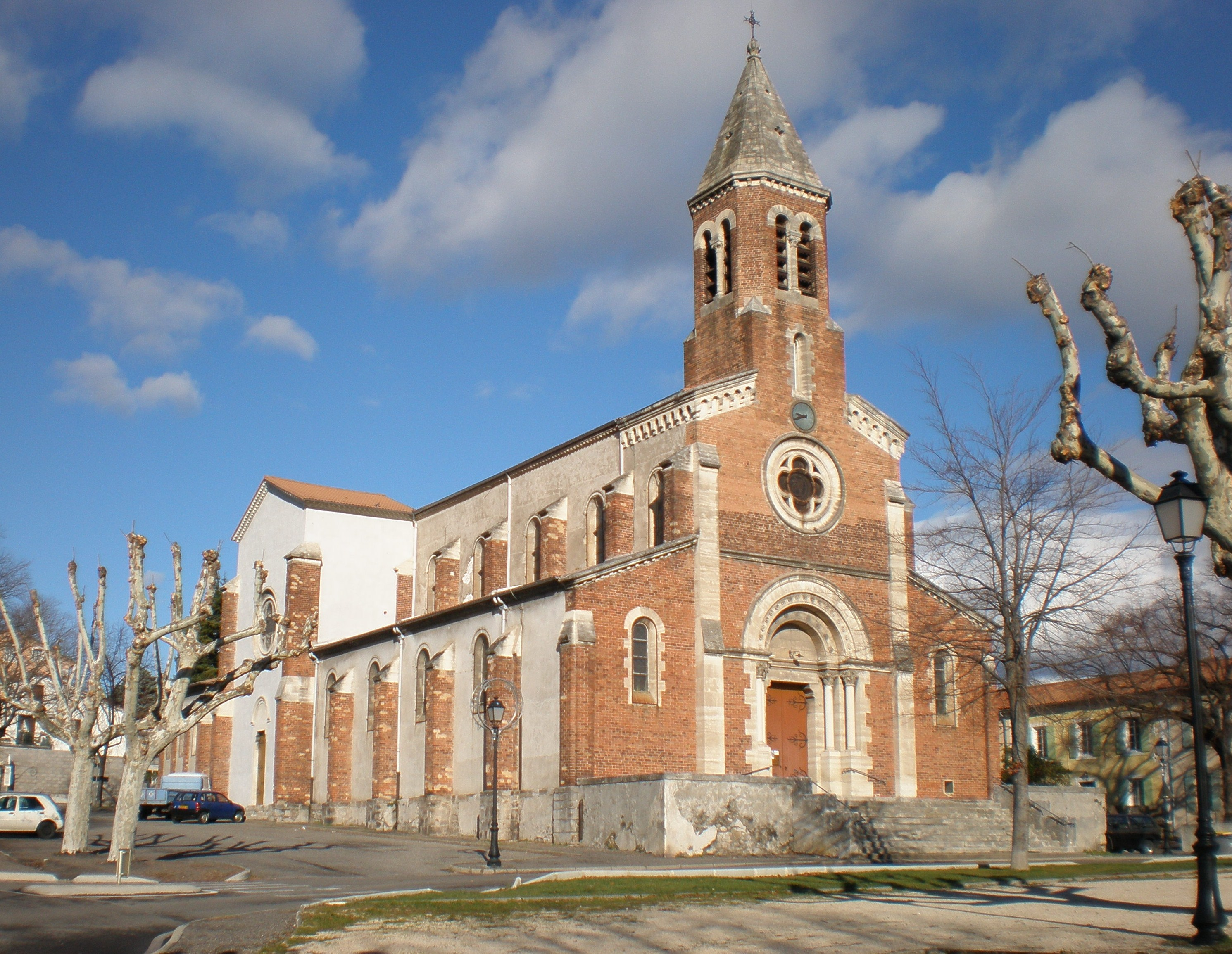 Eglise Saint-Eloi de Tamaris à Alès (Gard)